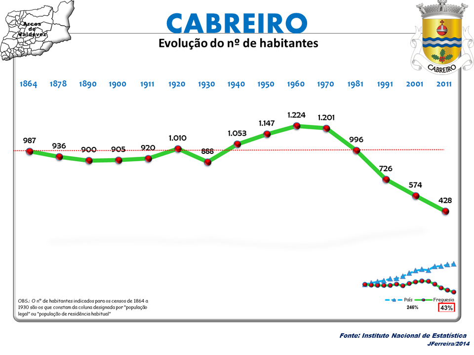 Censoa 1864/2011